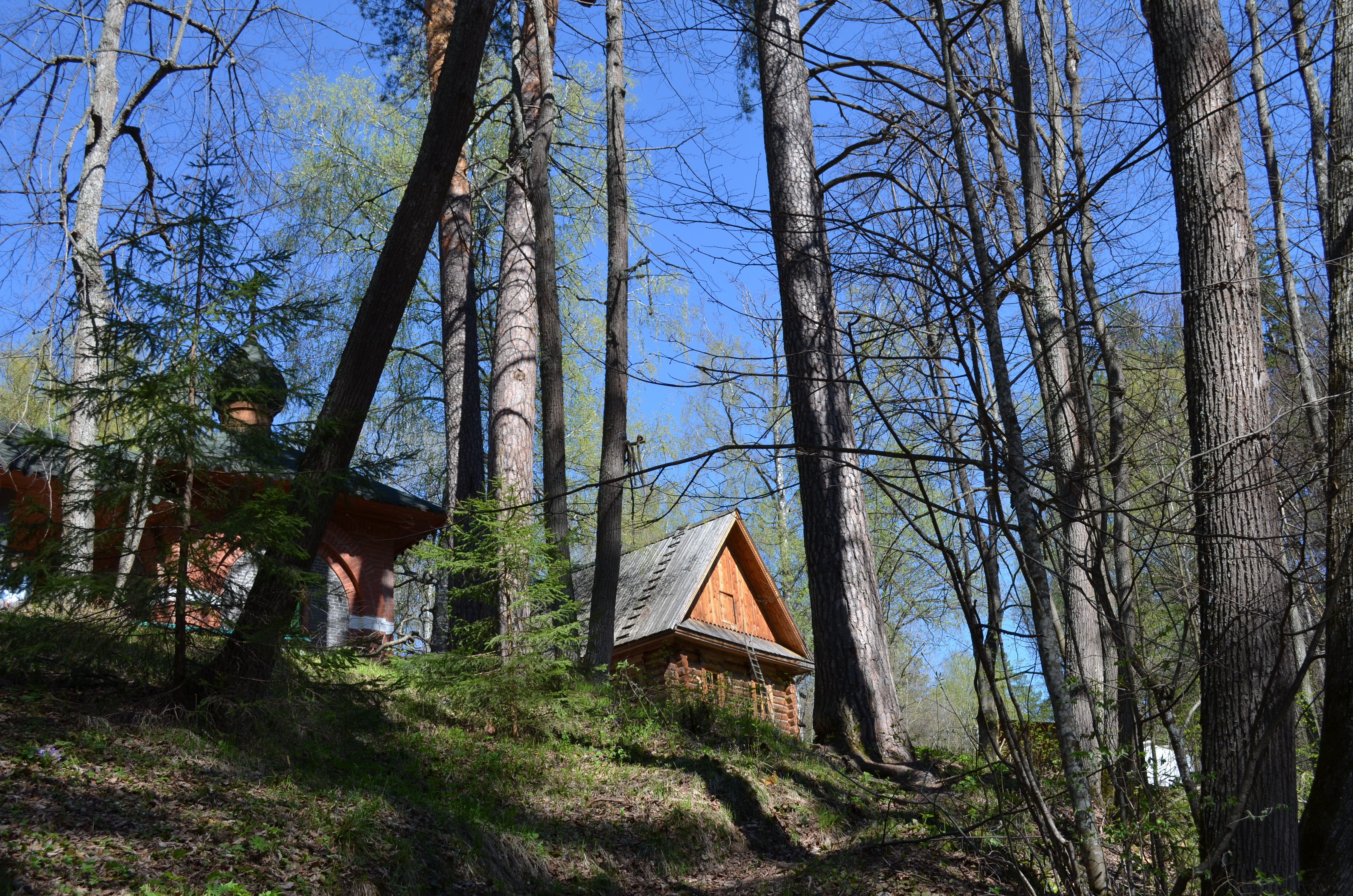 Дальняя и Ближняя Пустыньки, Саров This image is related to the protected area of Russia number 5210467